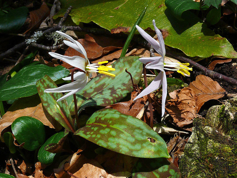 Кандык кавказский